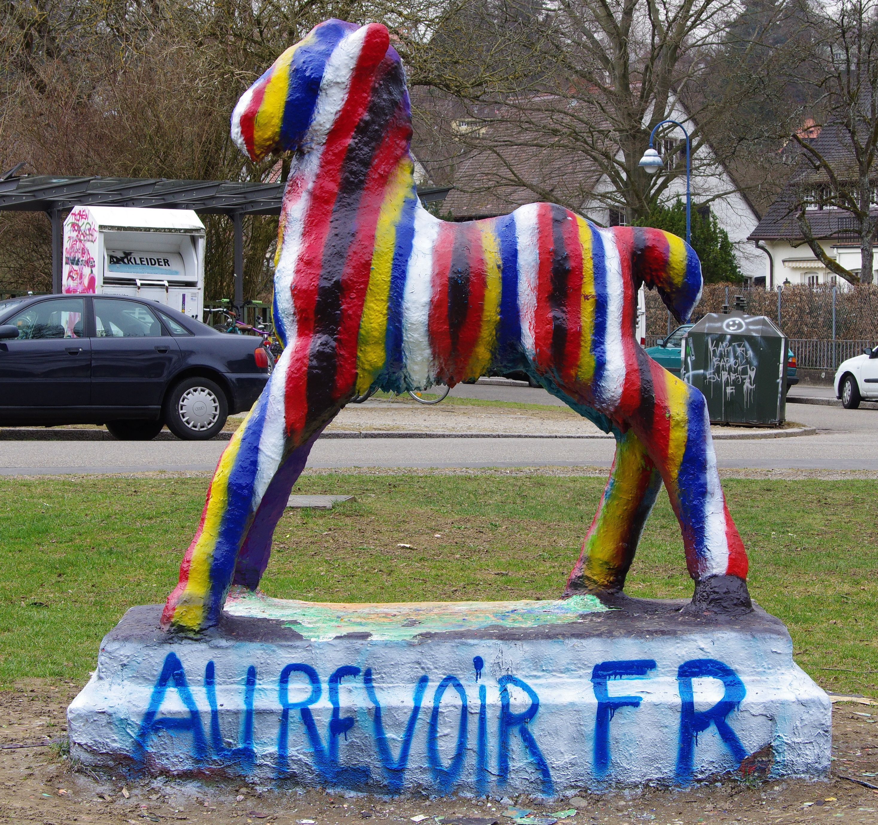 Das Holbeinpferdle am 17.03.2012